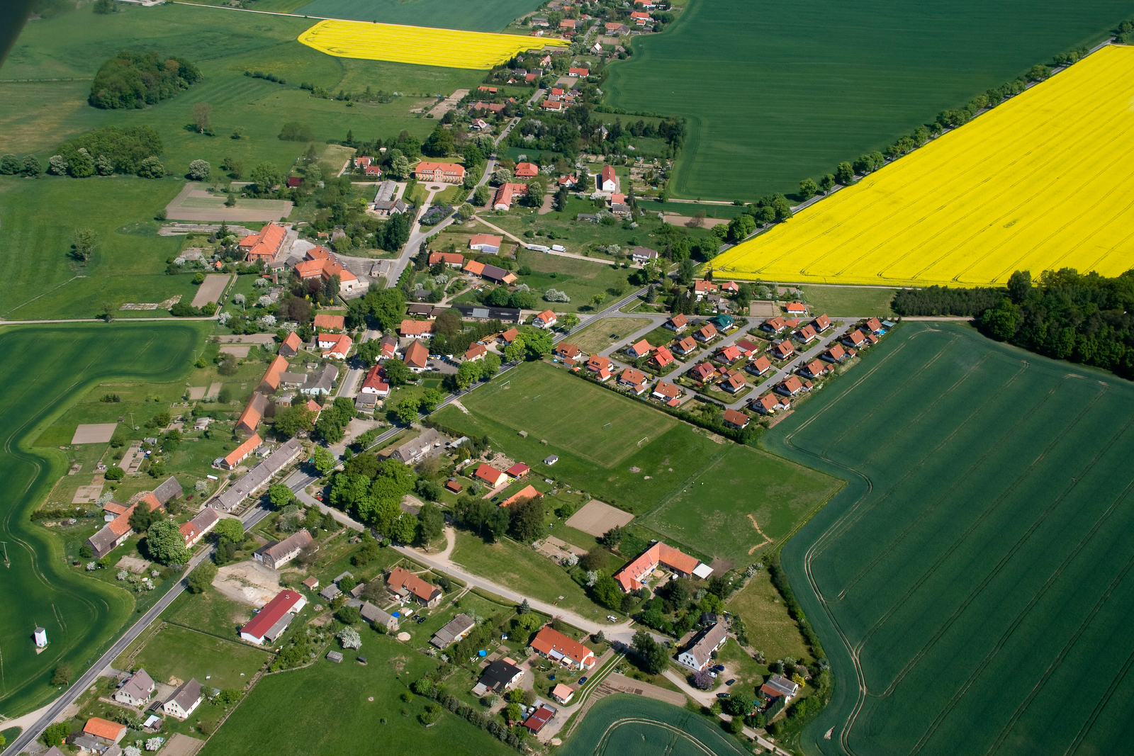 Luftbild von Rogeez aus südlicher Richtung